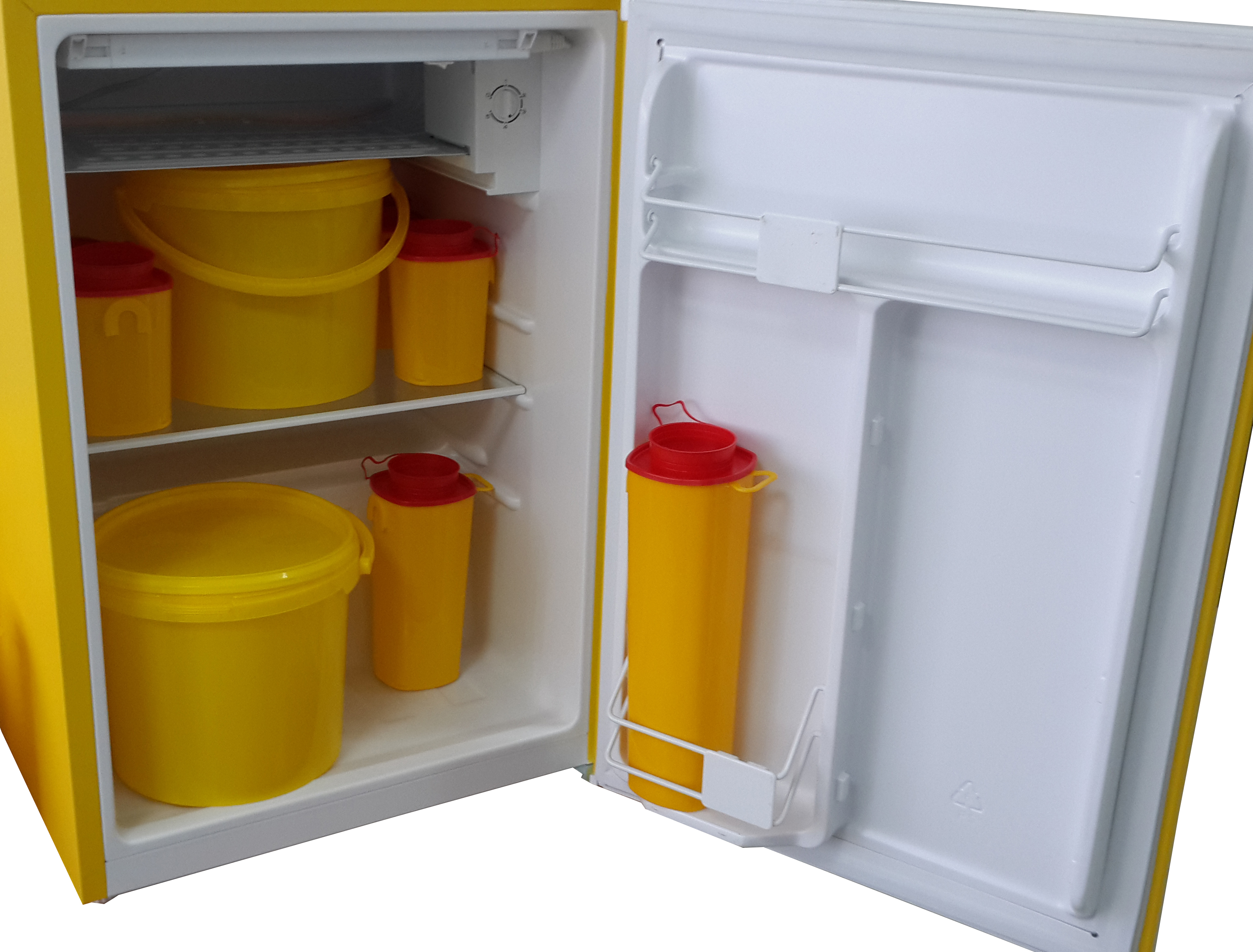 Холодильник и емкости для хранения медотходов